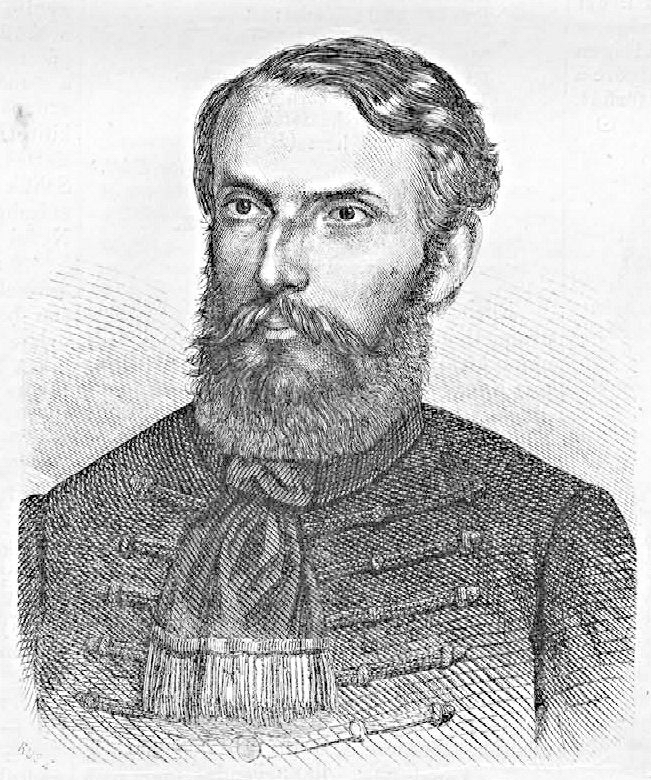 Récsi Emil (1822–1864) magyar jogtudós, műfordító. Rusz Károly metszete. (Vasárnapi Ujság, 1864. június 12.)